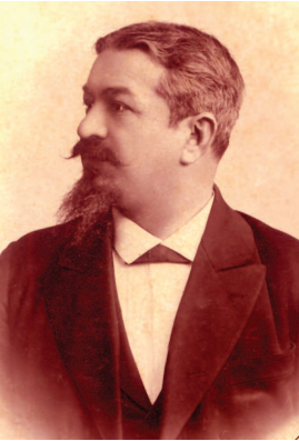 Академик Стефан Бобчев